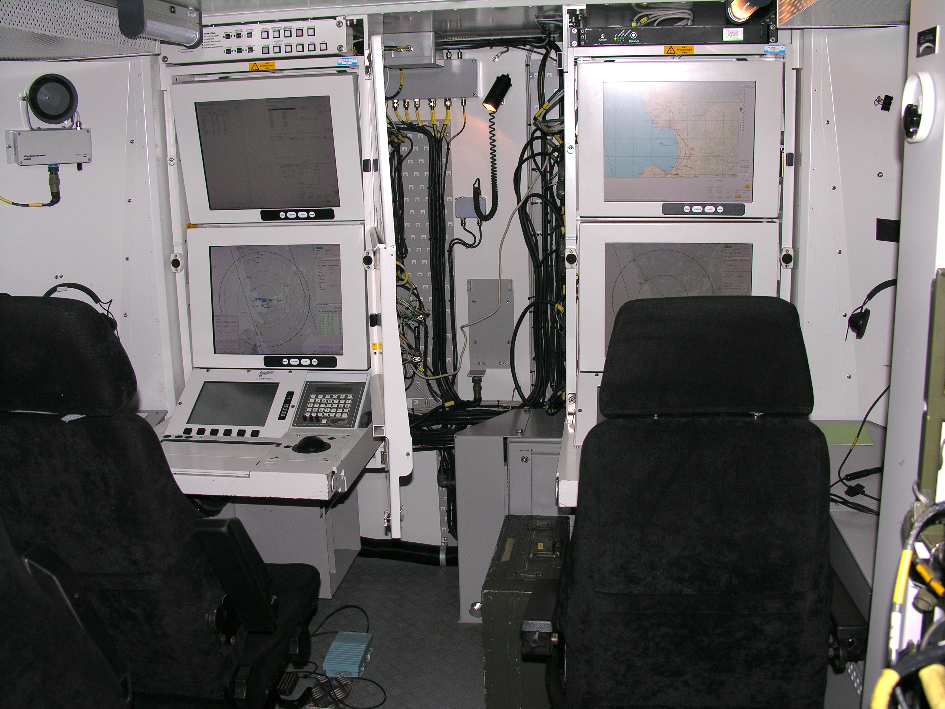 Интерьер РЛС Giraffe AMB